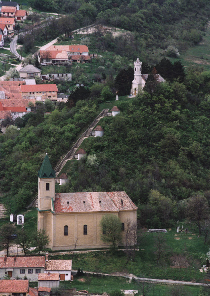 Kálvária - Magyarpolány - Hungary - Europe